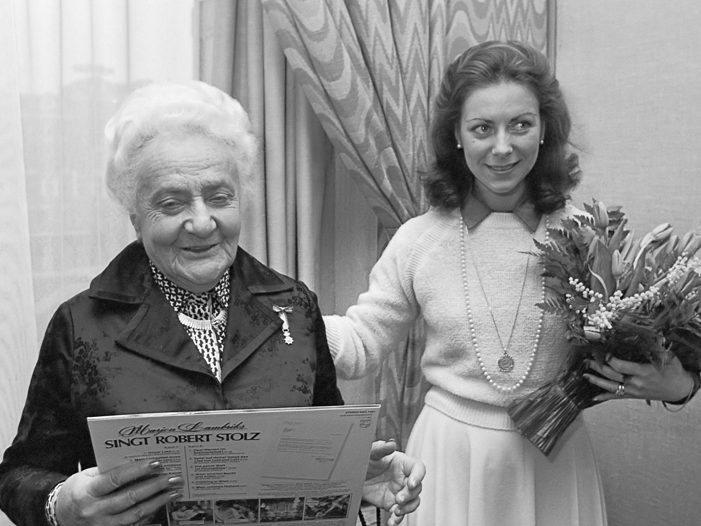 Presentatie LP "Marjon Lambriks zingt Robert Stolz " in Amstelhotel Amsterdam; zangeres Paula Lindberg 3 januari 1980